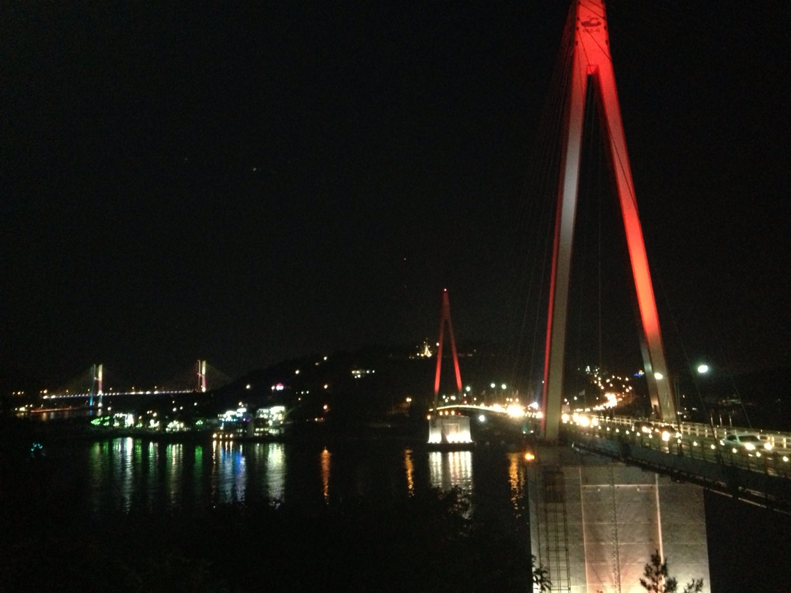 여수의 아경